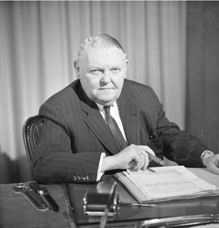 Minister Erhard - Portrait